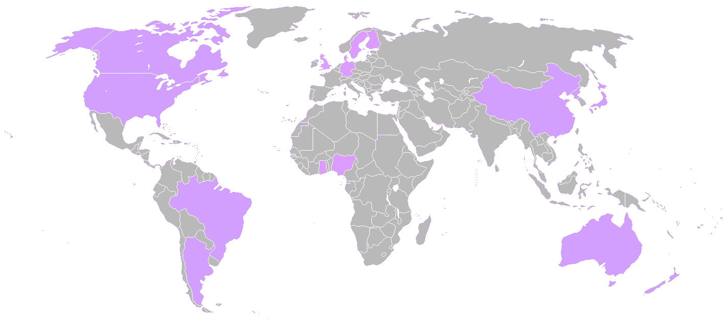 2007年女子世界盃足球賽參與國家